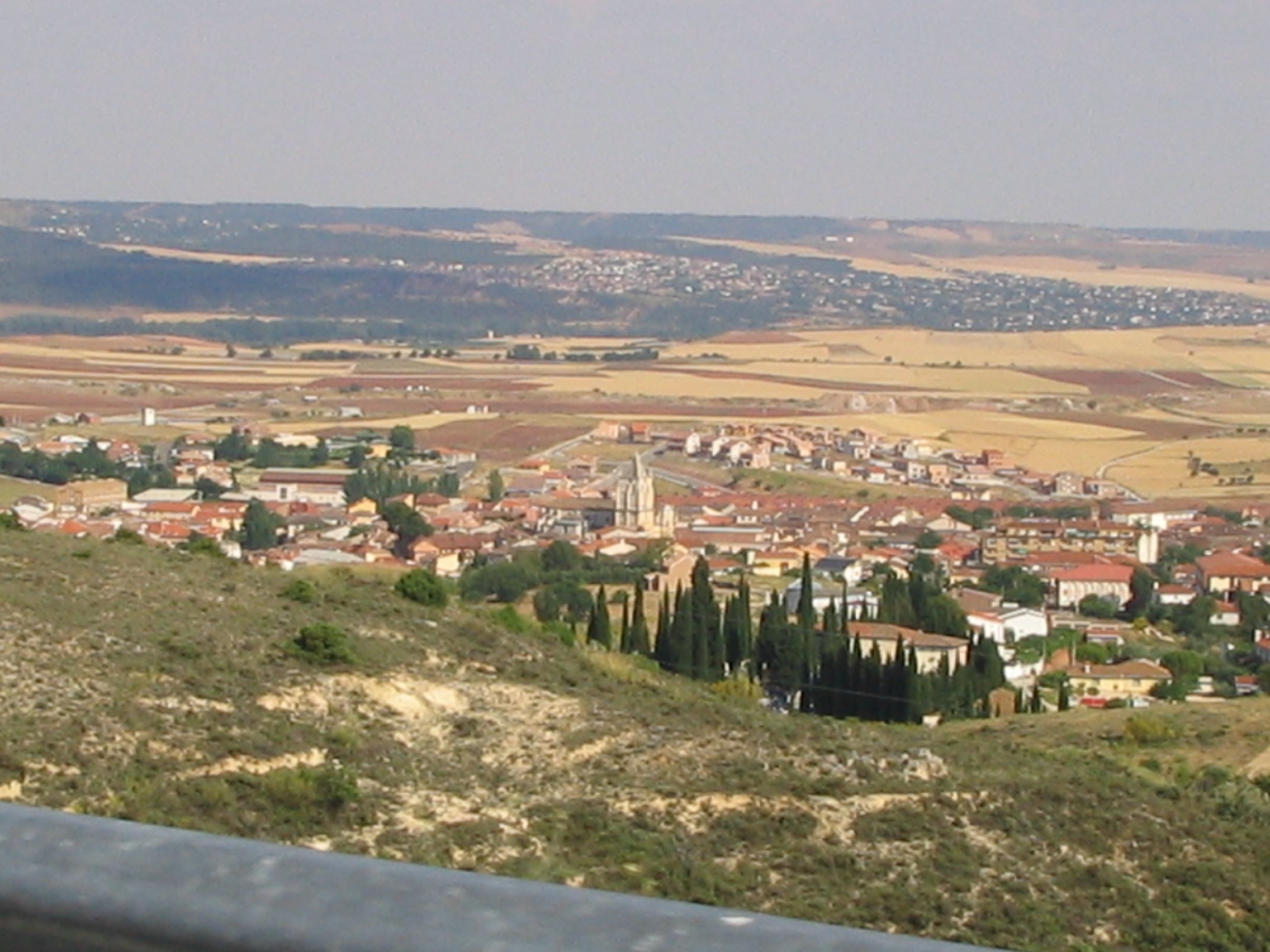 Torrelaguna vista dese montañas próximas.